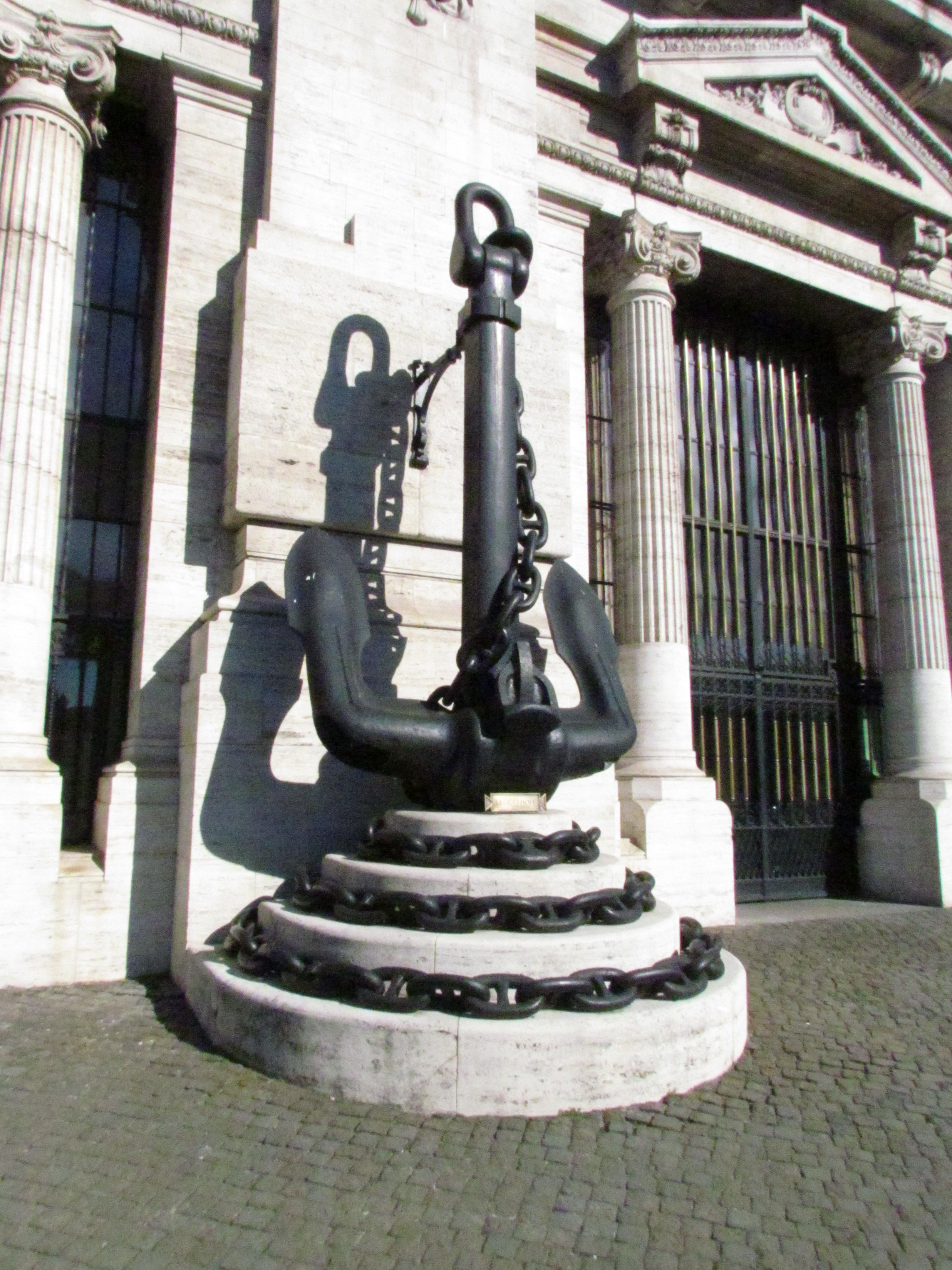 Bildinhalt: Anker des Schlachtschiffs "Tegetthoff" vor dem Palazzo della Marina in Rom Aufnahmeort: Rom, Italien